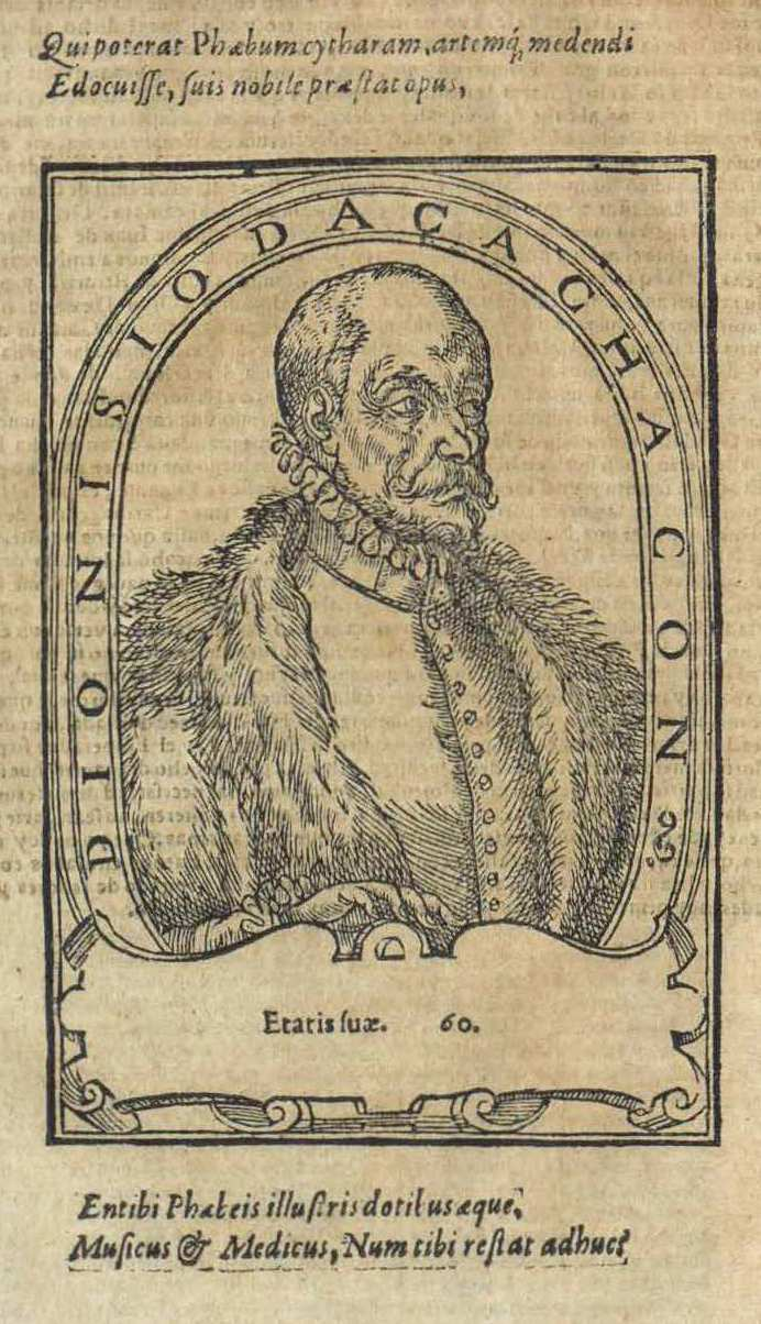 Retrato xilográfico de Dionisio Daza Chacón a sus 60 años. Ilustración de "Pratica y theorica de cirugia en romance y latin compuesta por el Licenciado Dionysio Daça Chacon", en Valladolid, por Bernardino de S. Domingo, 1584